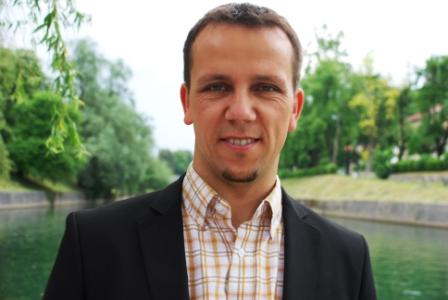 Darko Krajnc